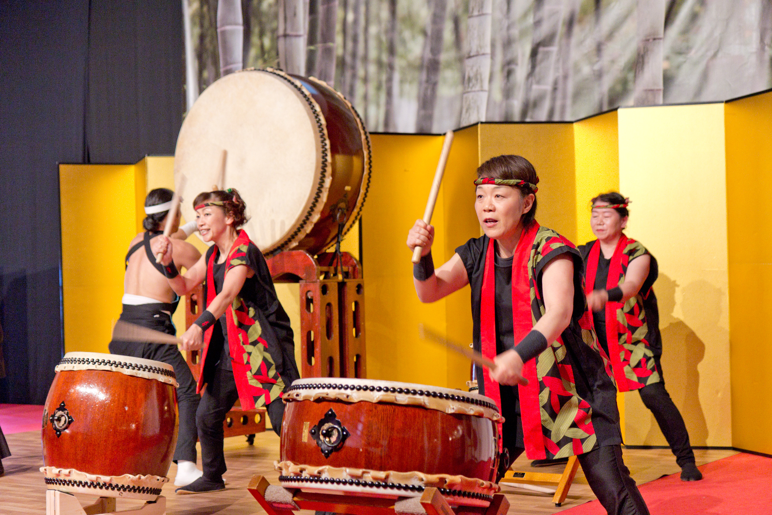 Wächtersbacher Messe 2012 - Taiko-Darbietung (和太鼓)